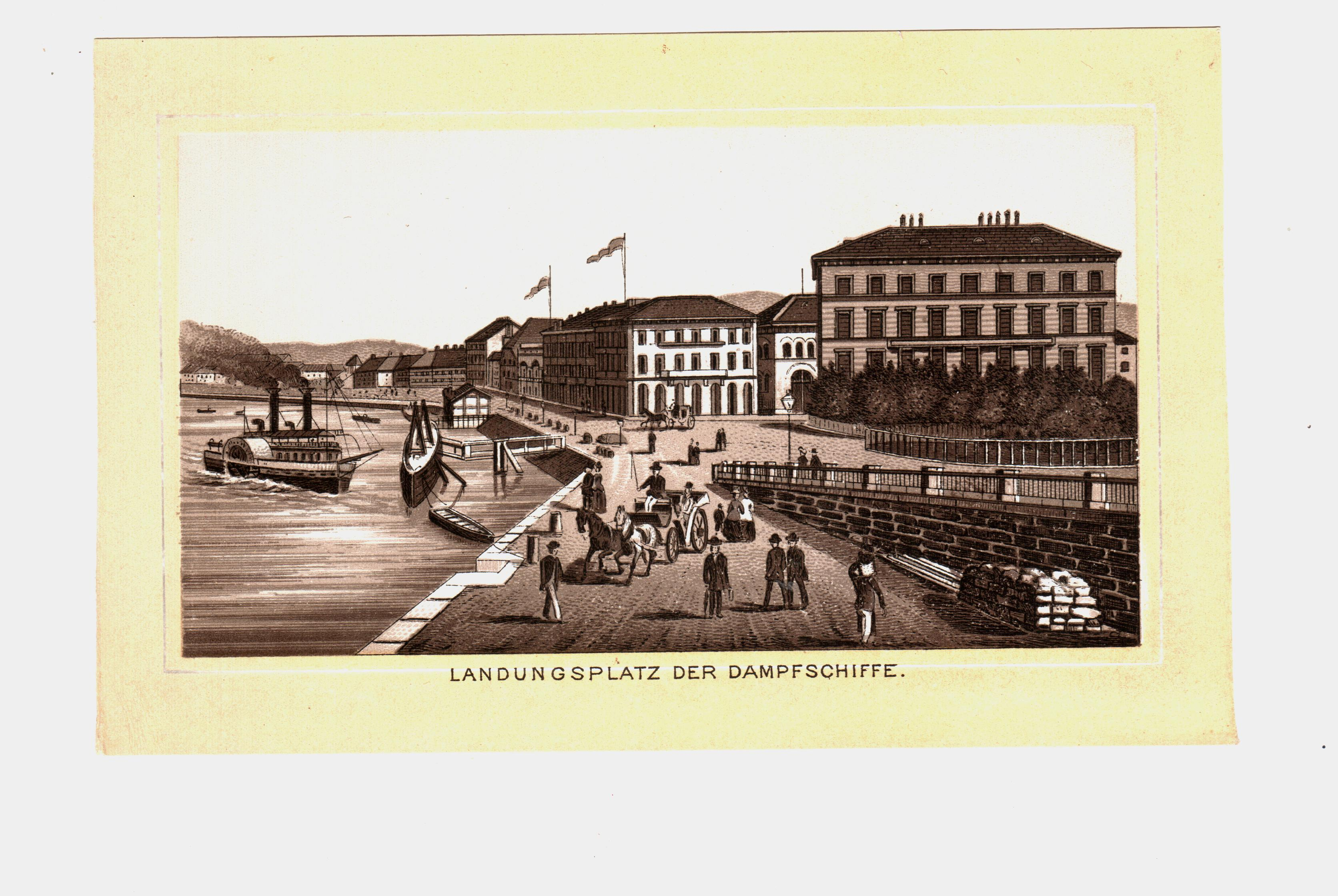 Osztrák-Magyar Monarchia, Linz. Ferdinand Zöhrer fényképe. PD-old. Az Album von Linz című fényképalbum fényképeiből. A 12 fénykép leporellóként összehajtogatott fotópapír szalagra készült. A fényképek mérete: 10,4 cm x 5,5 cm. A fényképek hátoldalán ex-libris. ©© Megjelent Creative Commons alatt a Metapolisz sorozatban. A Metapolisz sorozat valamennyi képe és filmje Creative Commons alatti valamint kereskedelmi - for profit - célra is felhasználható. Ajánlott hivatkozás: Derzsi Elekes Andor: Metapolisz DVD line ©© Published under Creative Commons in the Metapolisz DVD line. All of the photos and vids in the Metapolisz DVD line are under Creative Commons and can be used even for commercial – for profit – purposes. Recommended Citation Derzsi Elekes Andor: Metapolisz DVD line